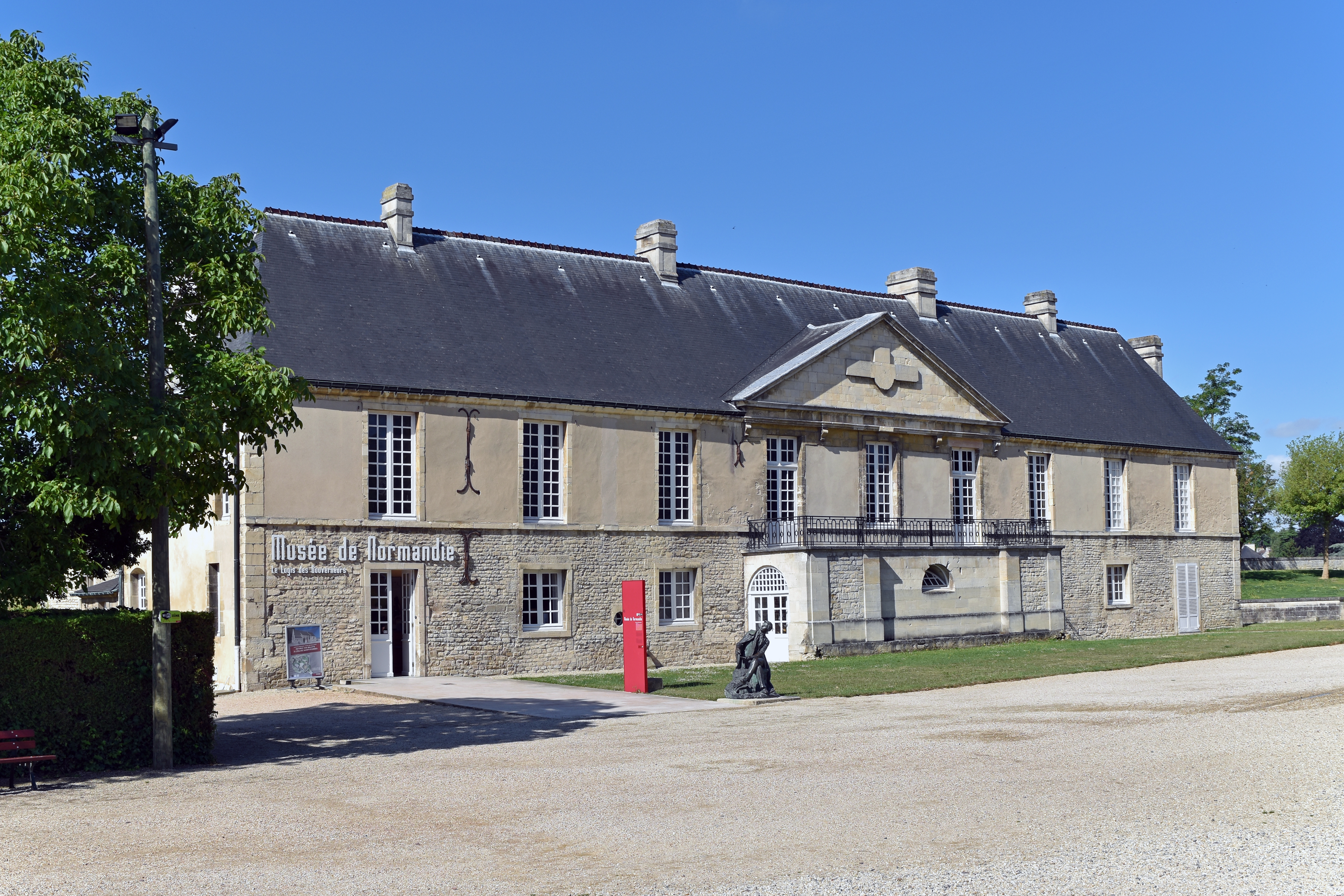 Logis des Gouverneurs du château de Caen, Calvados, France .